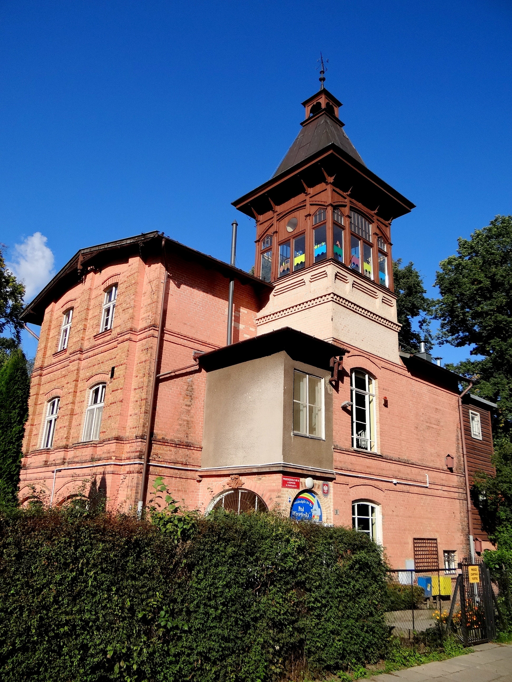 Sopot Dolny, ul. Kościuszki 31 - dom dla gości w zespole willi Herbstów, 1878, 1891-1896, 1910